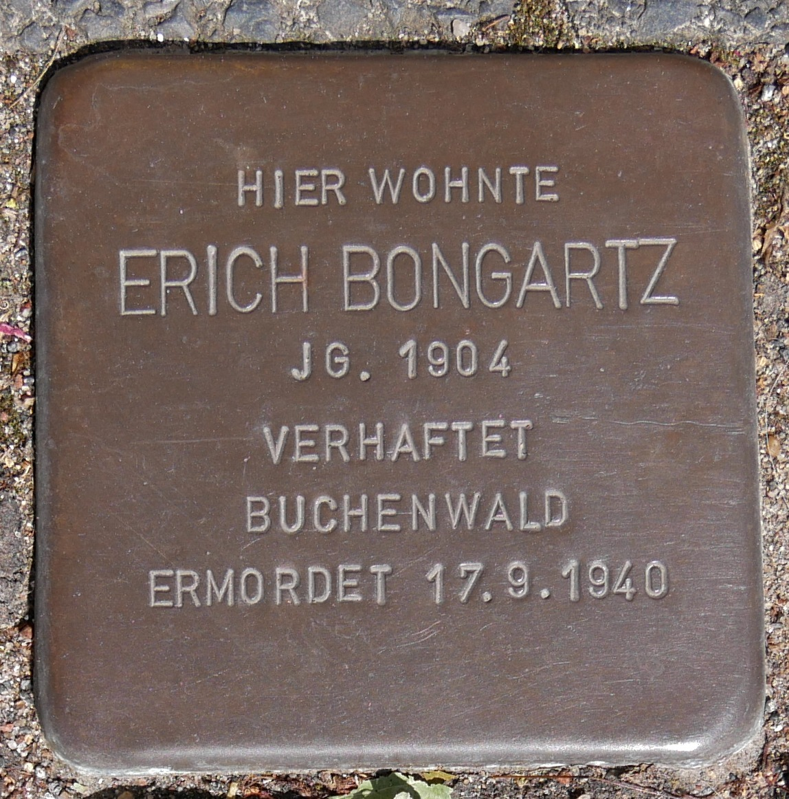 Stolpersteine Wesel: Bongartz, Erich